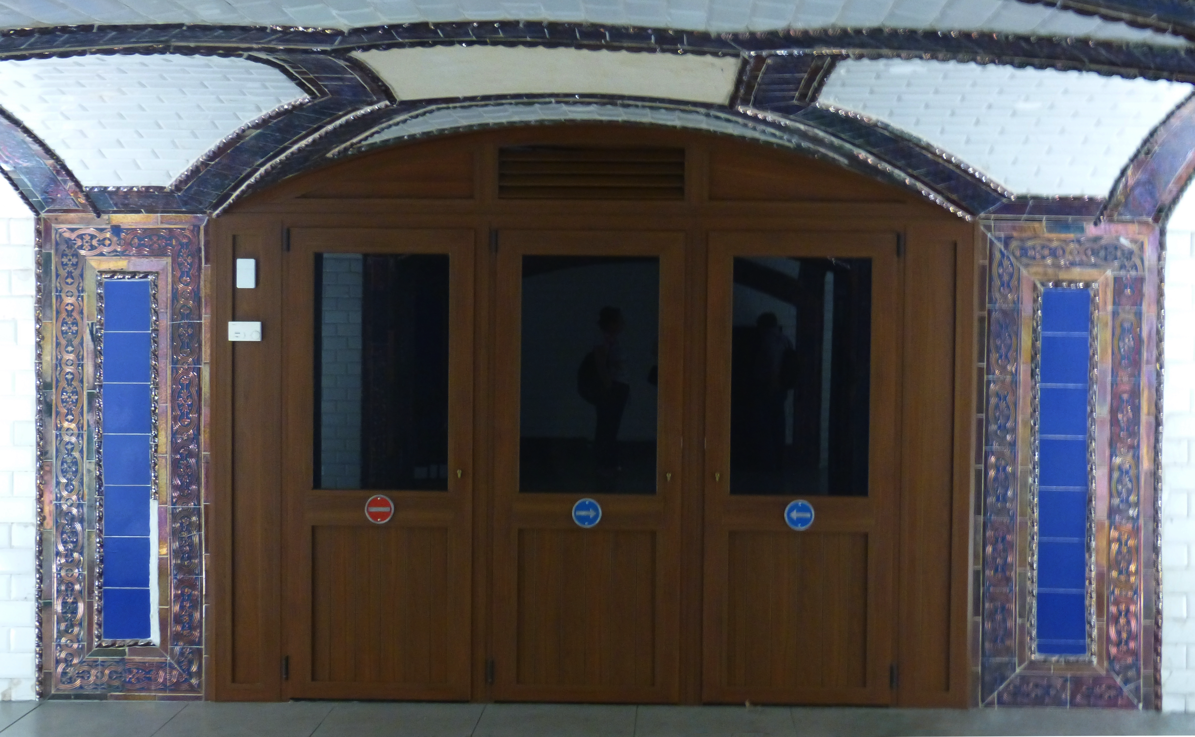 Puerta de acceso al vestíbulo original de Pacífico, de 1923